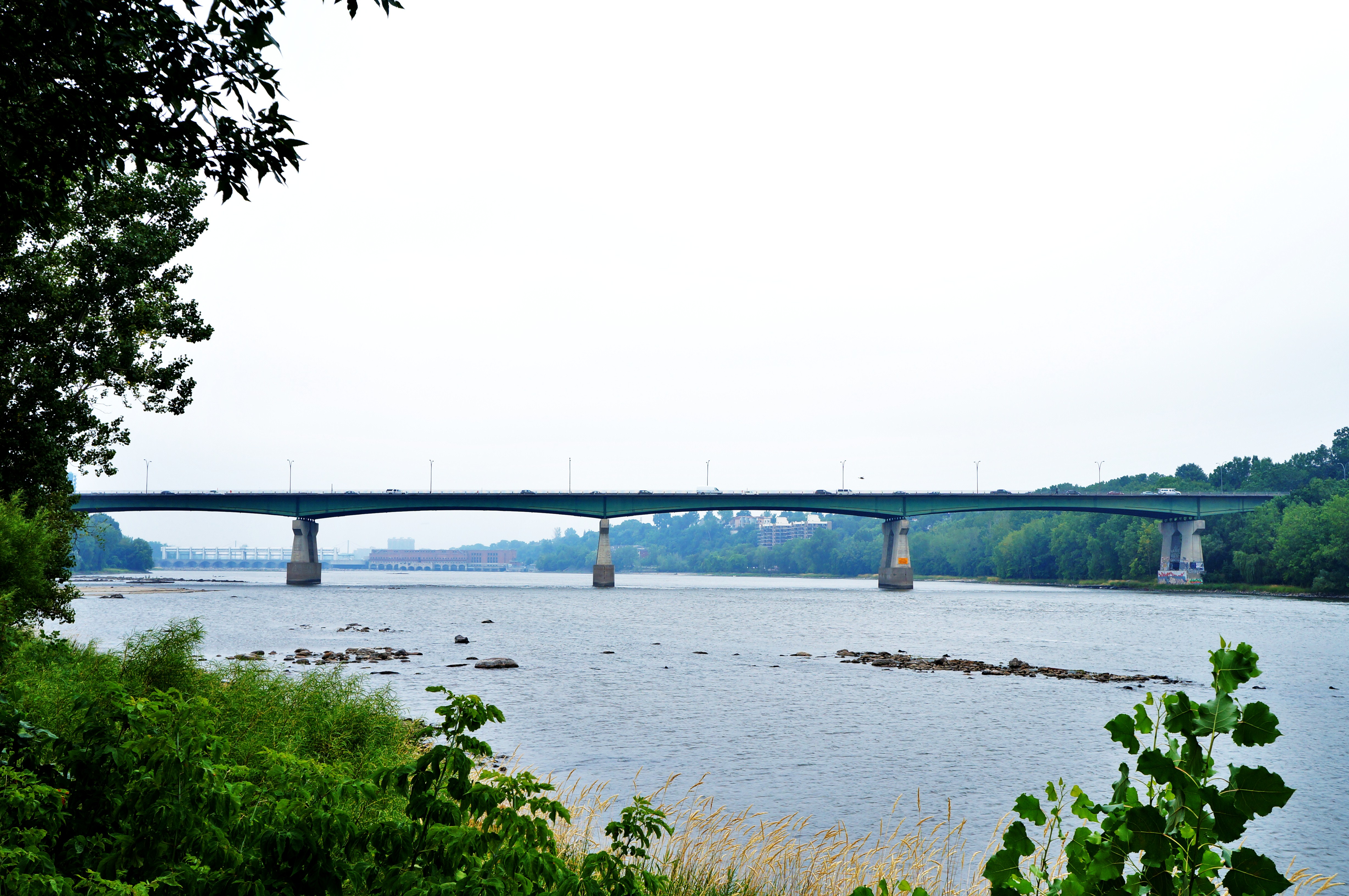 Pie-IX Bridge being seen entirely